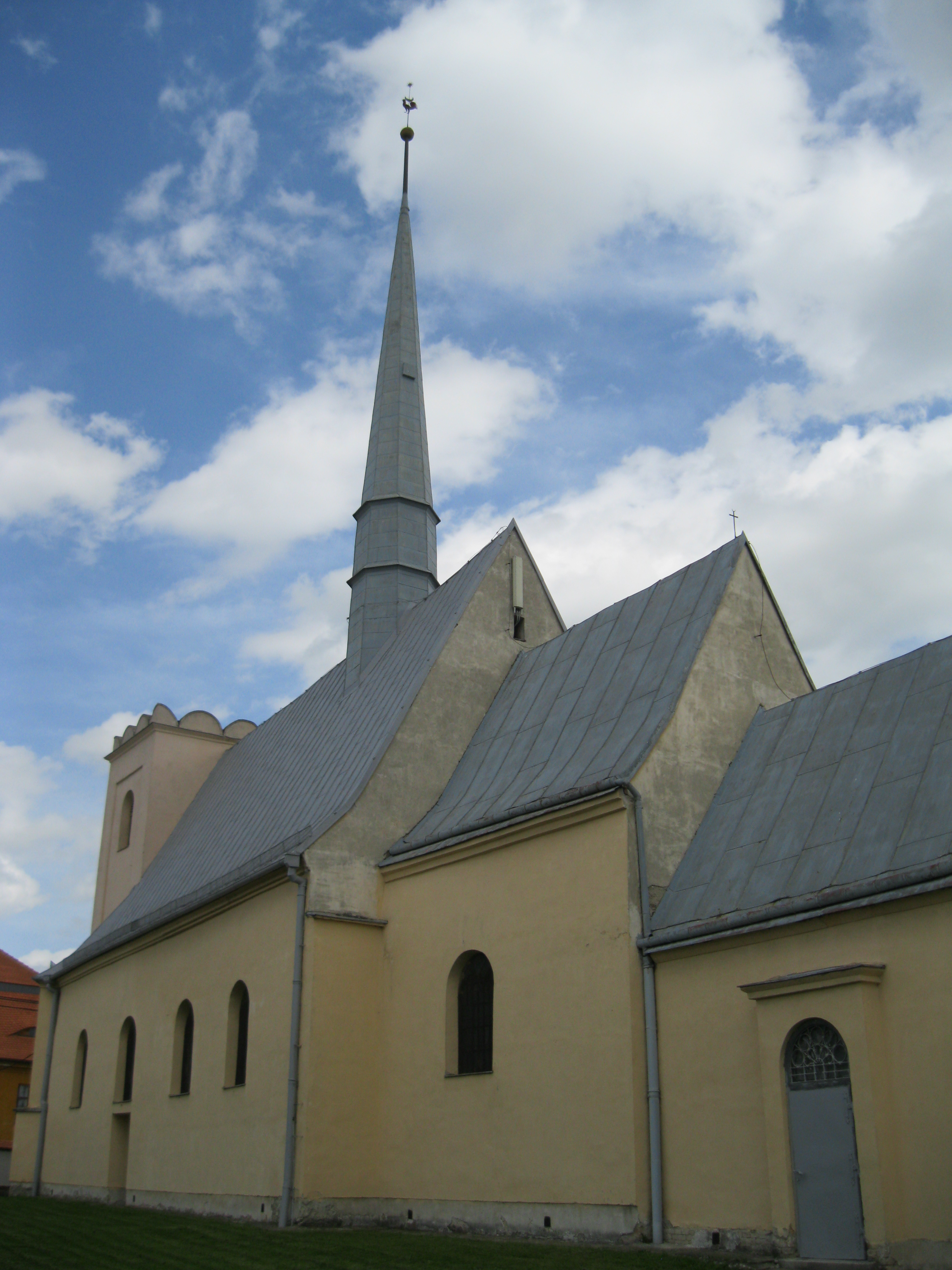 Kostel sv. Ondřeje (Olomouc), střed obce, Olomouc